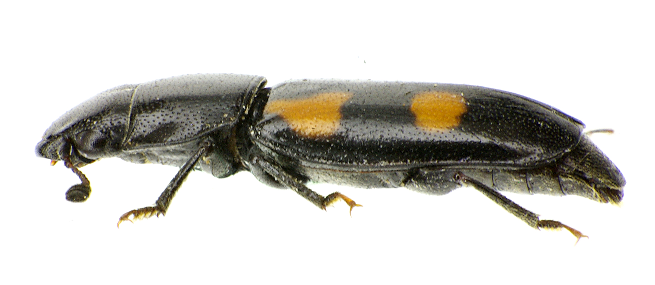 Glischrochilus quadripunctatus aus Süddeutschland bei Spaichingen, Seitenansicht